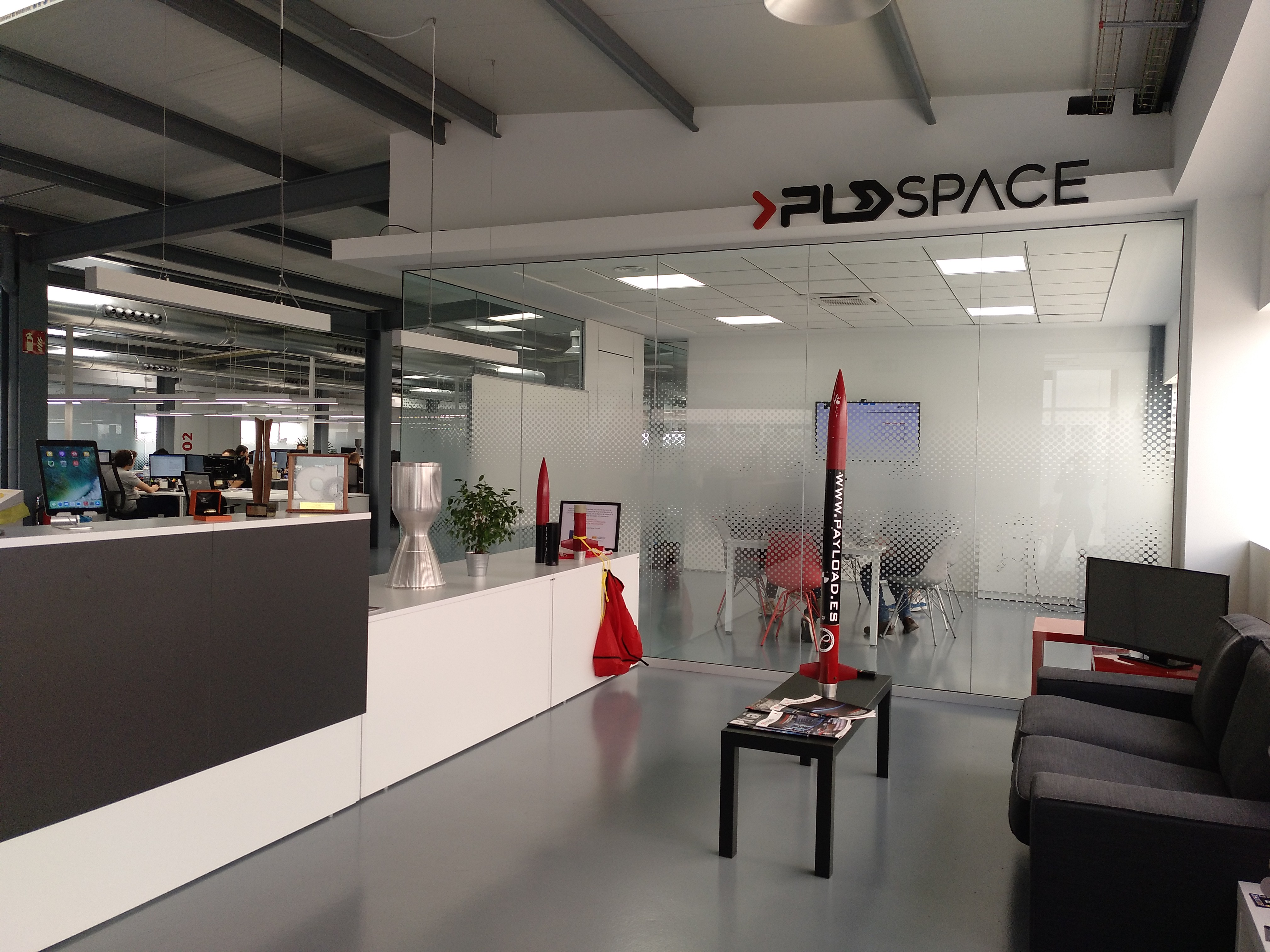 Sede de PLD Space en Elche, Alicante, España.